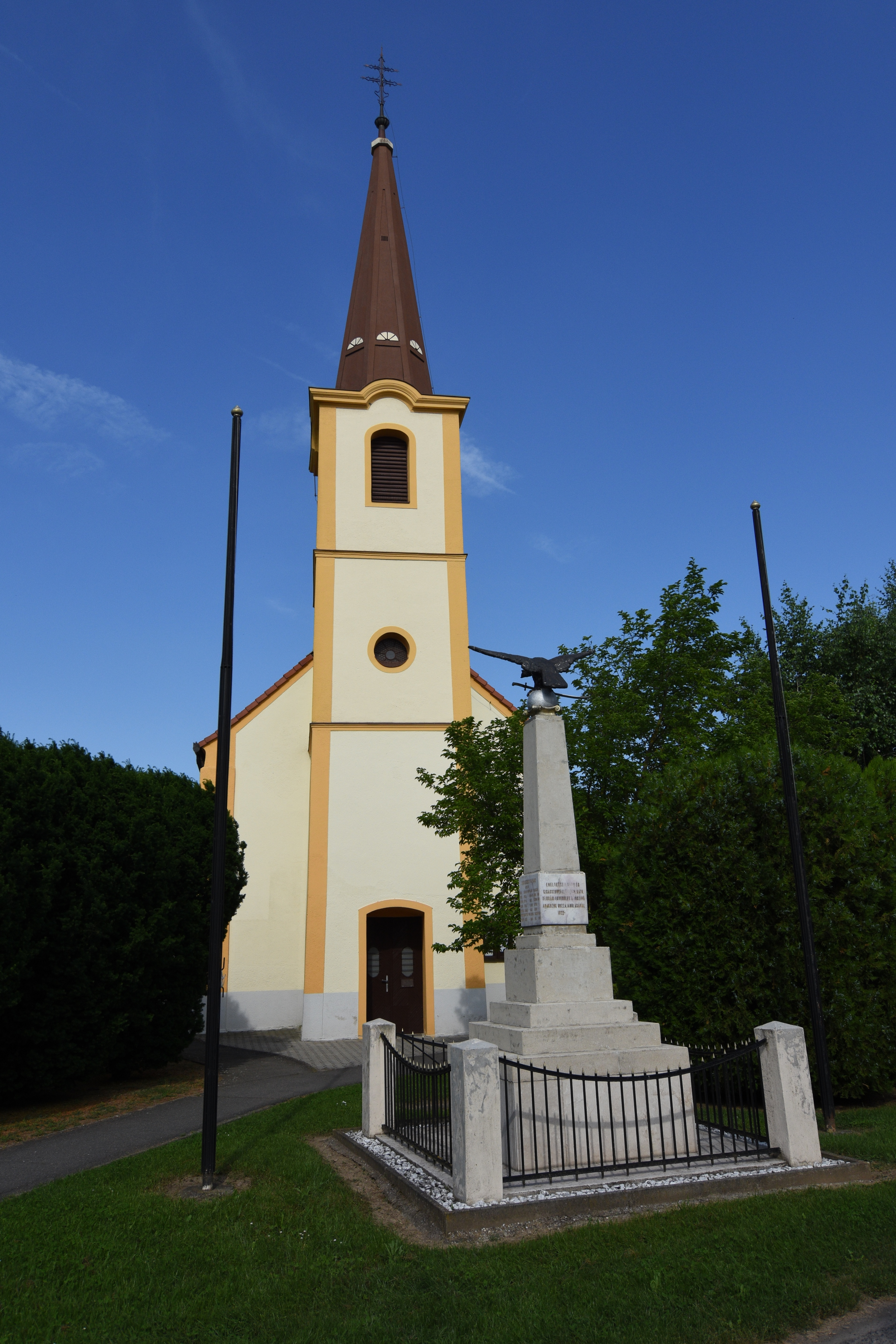 Roman Catholic Church in Vasasszonyfa